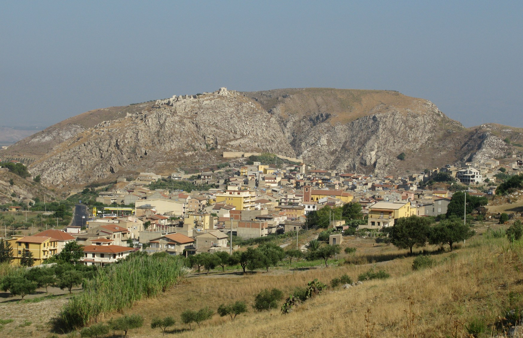 Panorama di Montallegro.